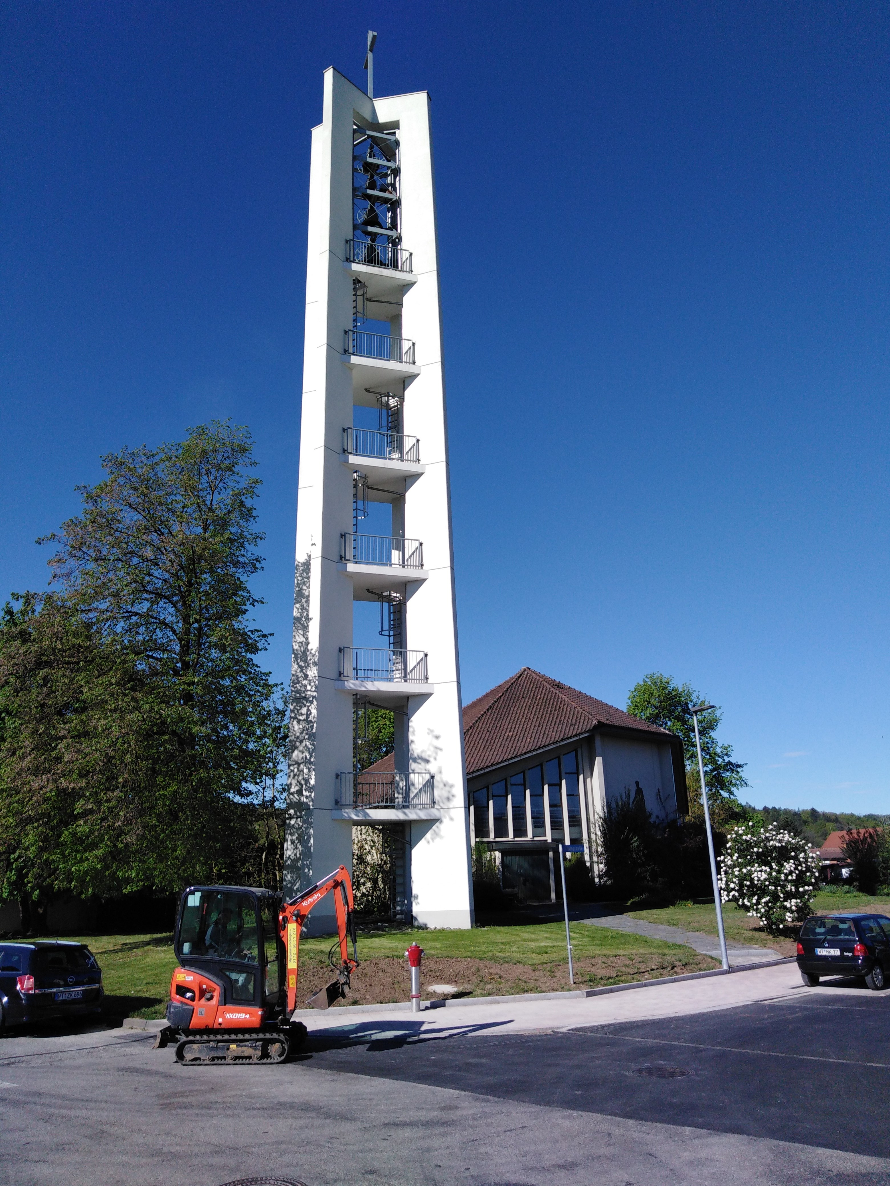 Lauchringen, Gemeinde im Landkreis Waldshut in Baden Württemberg.Die 1959 eingeweihte evangelische Matthäuskirche in Unterlauchringen.